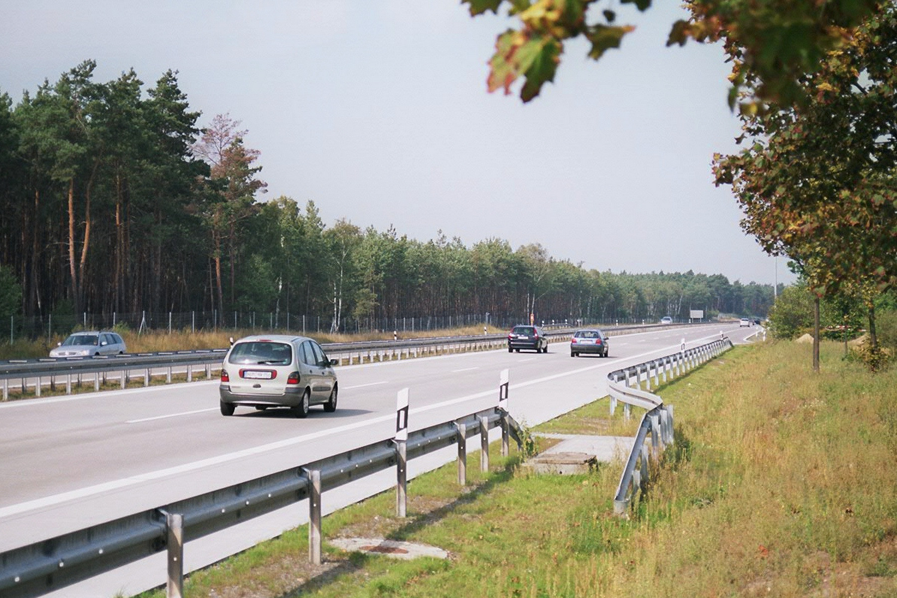 Bundesautobahn 13 Dresden–Berlin nahe dem Rasthof Berstetal, Blick in Fahrtrichtung Berlin